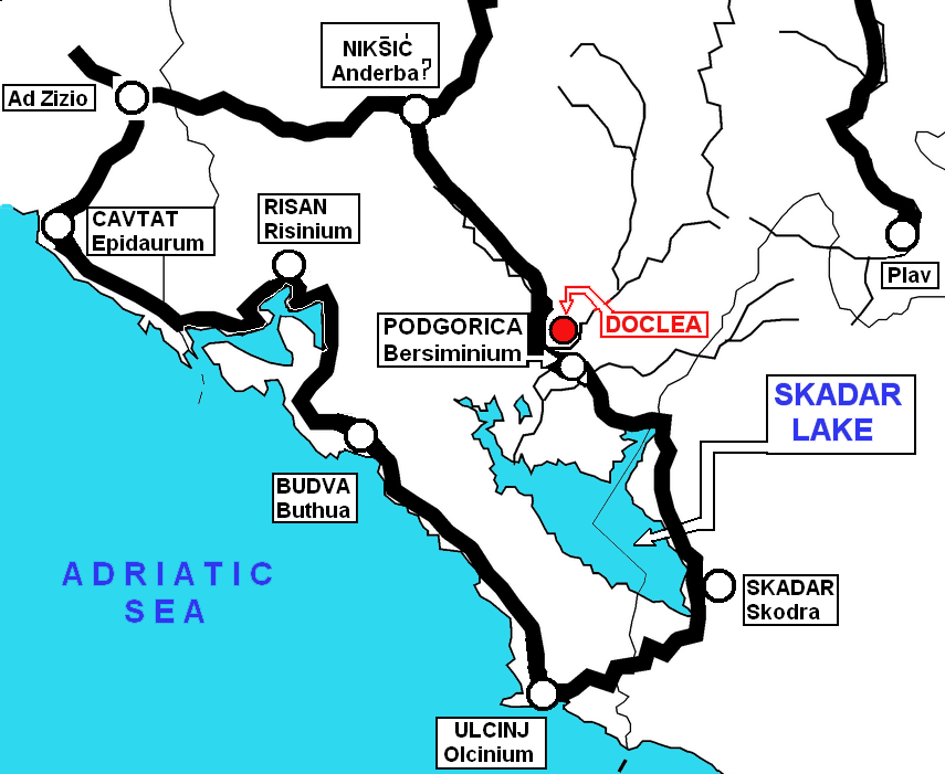 Roman Doclea, near Podgorica